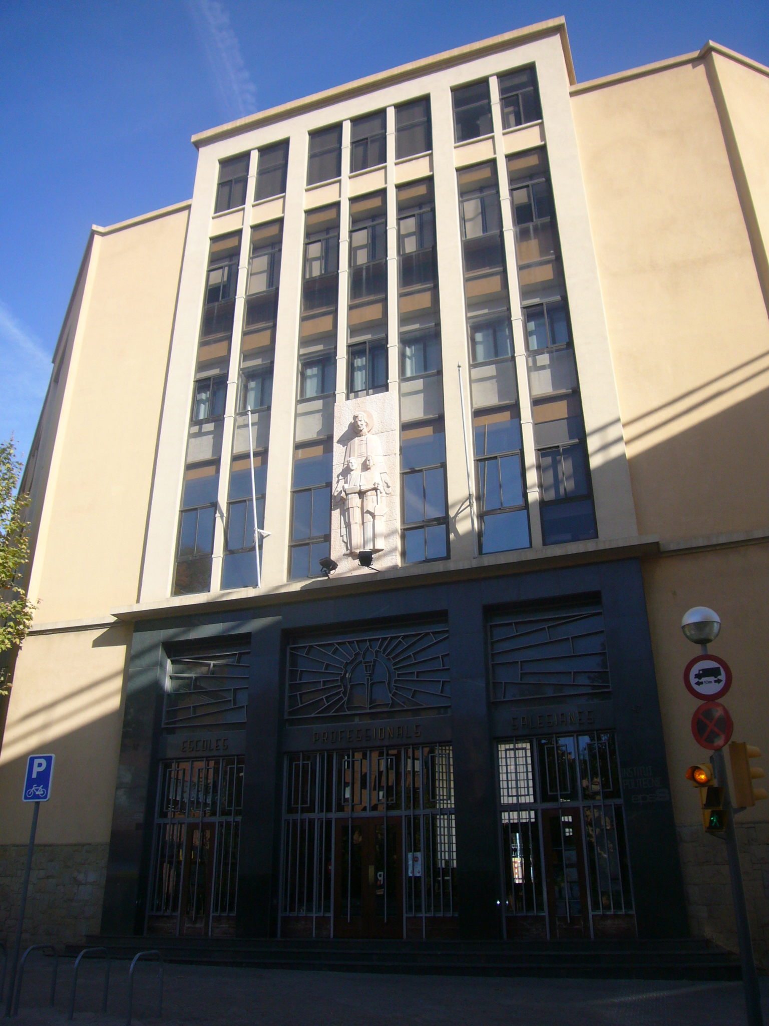 Escoles Professionals Salesianes, a la cantonada del passeig de sant Joan Bosco, amb carrer de Maria Auxiliadora